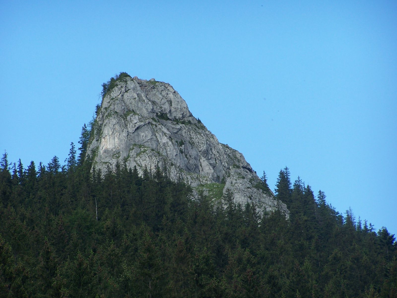 Kończysta Turnia (Tatra Mountains), view from Zahradziska